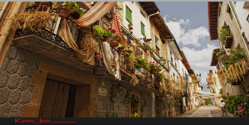 Benabarre fiesta de los salvajes calle engalanada